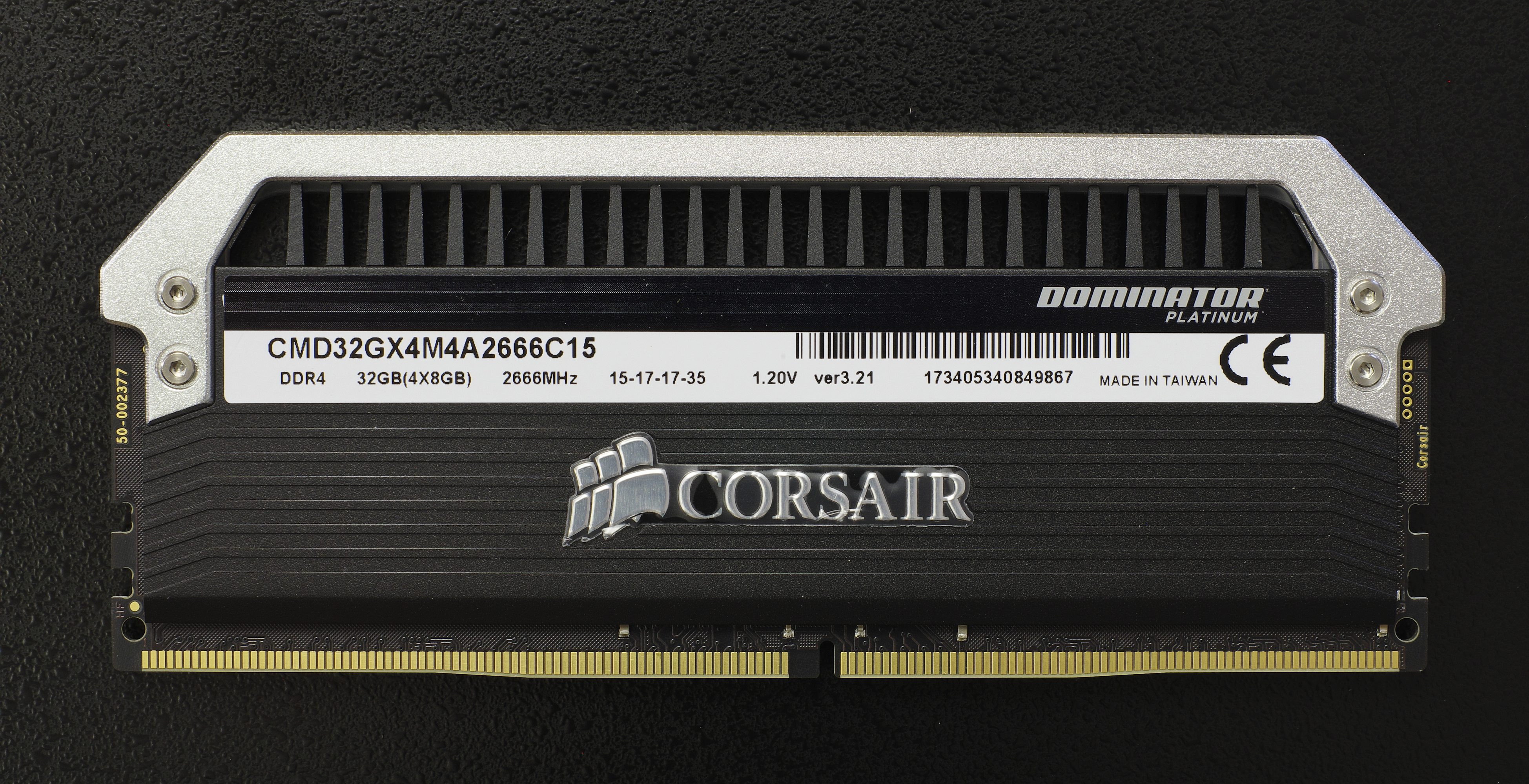 Corsair Dominator Platinum, DDR4 Ram 8 GB 2666 MHz 15-17-17-35 1.2V. Wird als 32-GB-Kit, bestehend aus vier Riegeln verkauft. Diese Speicherriegel sind mit massiven Kühlkörpern sowie LED-Beleuchtung ausgestattet.